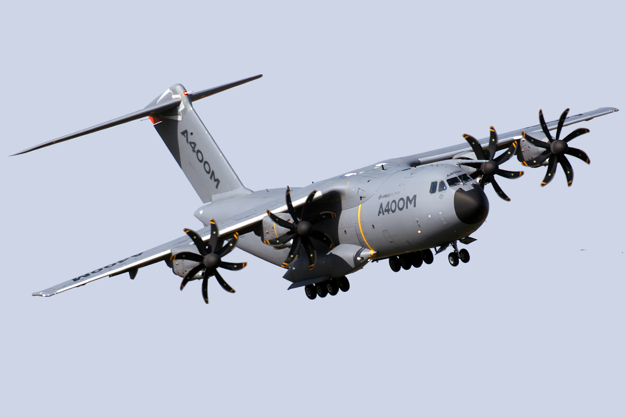 Sevilla LEZL/SVQ Airport